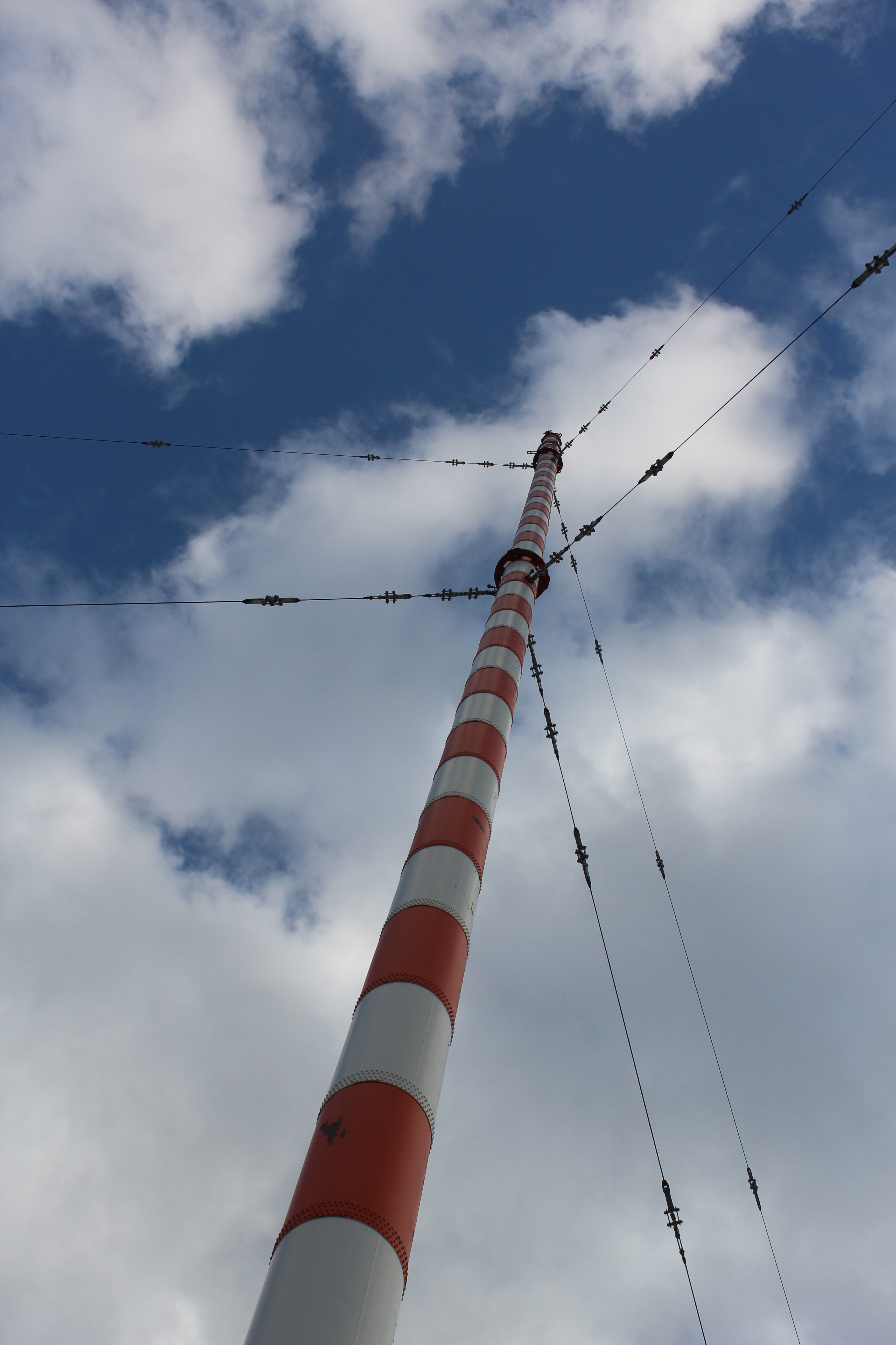 Der Rohrmast mit Sicherungsseilen des Mitellwellensenders in Wilsdruff